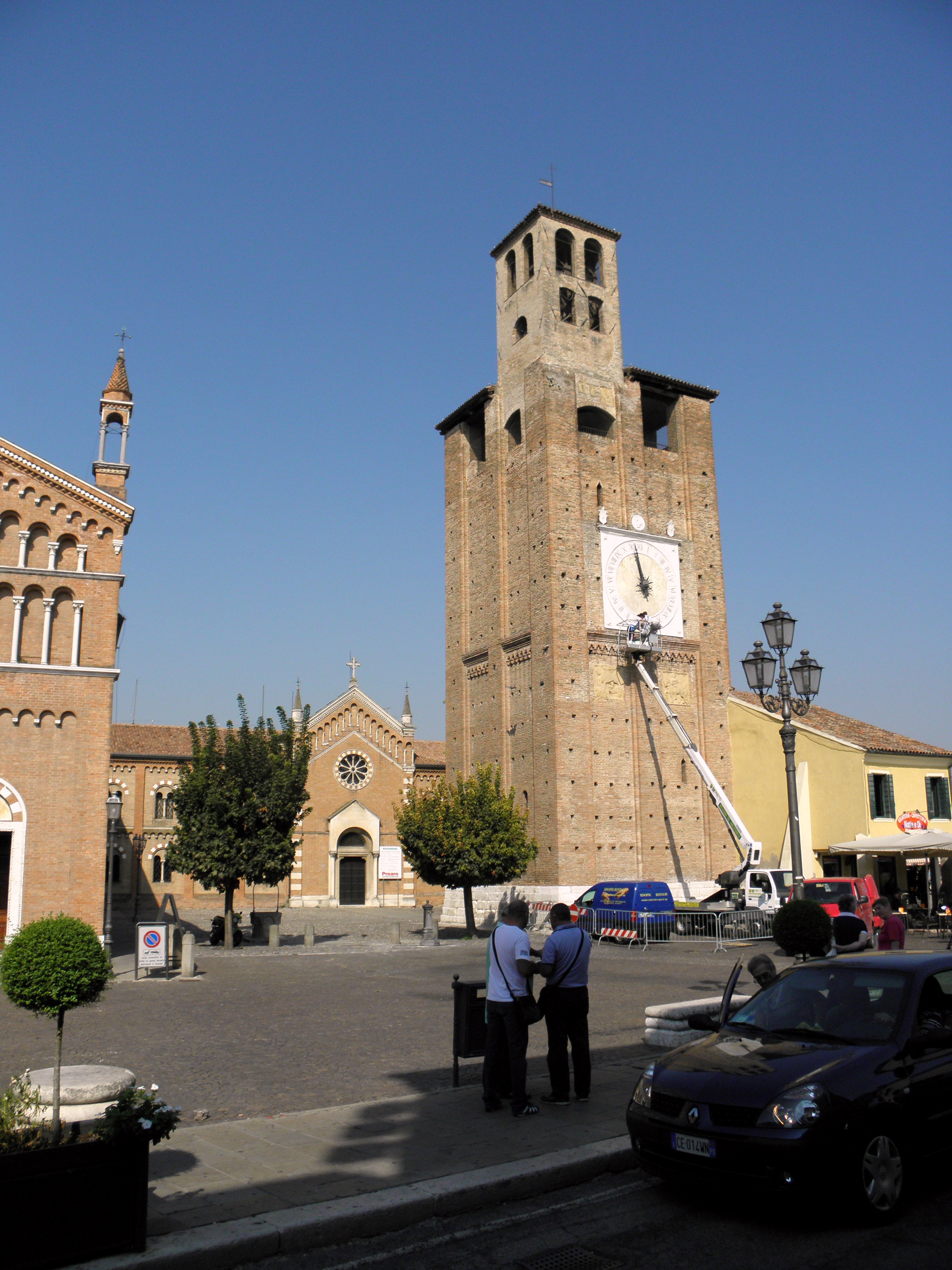 Piove di Sacco, Torre Carrarese (XV secolo). Successivamente rialzata e dotata di una cella campanaria, la torre svolge anche la funzione di campanile dell'adiacente Duomo.